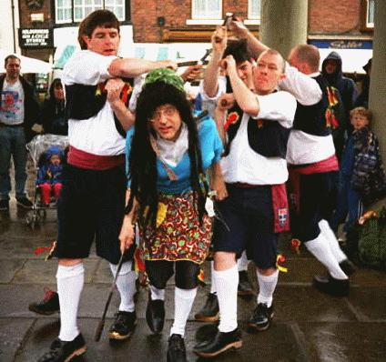 Newcastle Kingsmen Schwerttänzer / Beschreibung: Die Newcastle Kingsmen Schwerttänzer beim Aufführen des Rapper-Kettenschwerttanzes (siehe Rapper Sword) beim Beverley Folk Festival in Juni 1997. Inmitten des Bildes, durch die Tänzer, läuft die (der) »Betty«, eine(r) der zwei komische, zum Rapper-Tanz wesentliche Charakter.